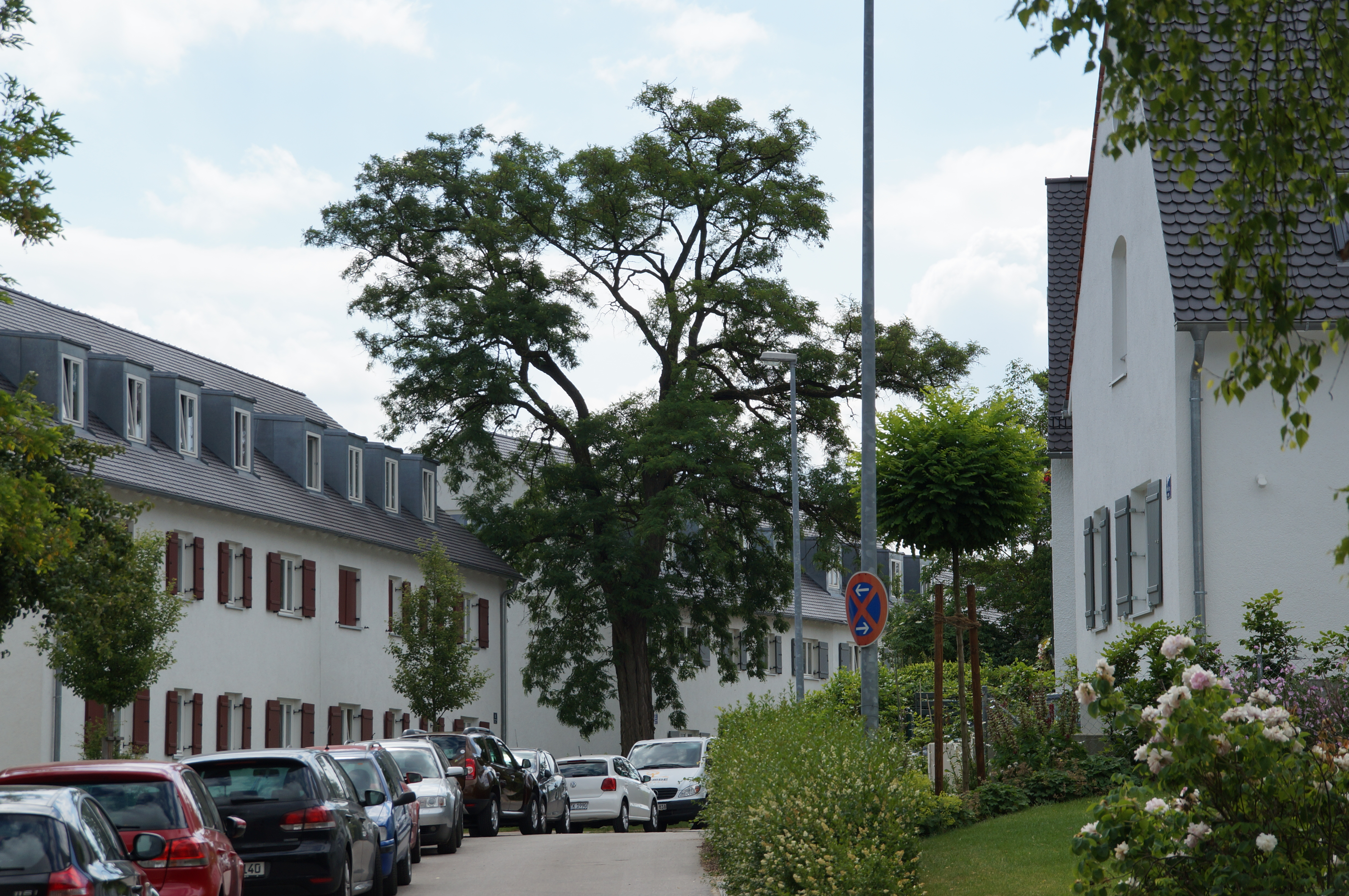 Ensemble Ganghofer-Siedlung, Regensburg, Maria-Herbert-Straße This is a photograph of an architectural monument.